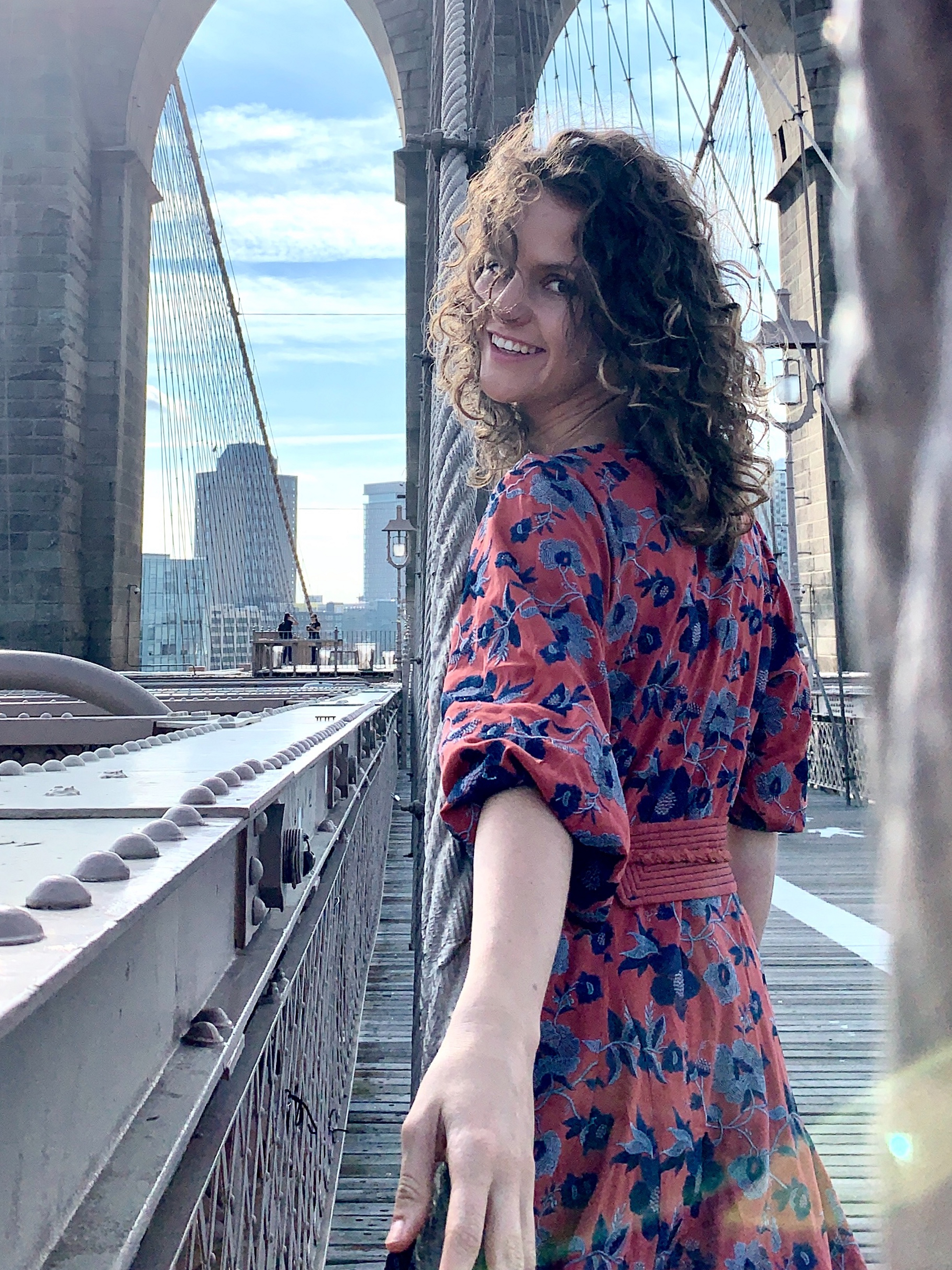 Schauspielerin Gioia Osthoff